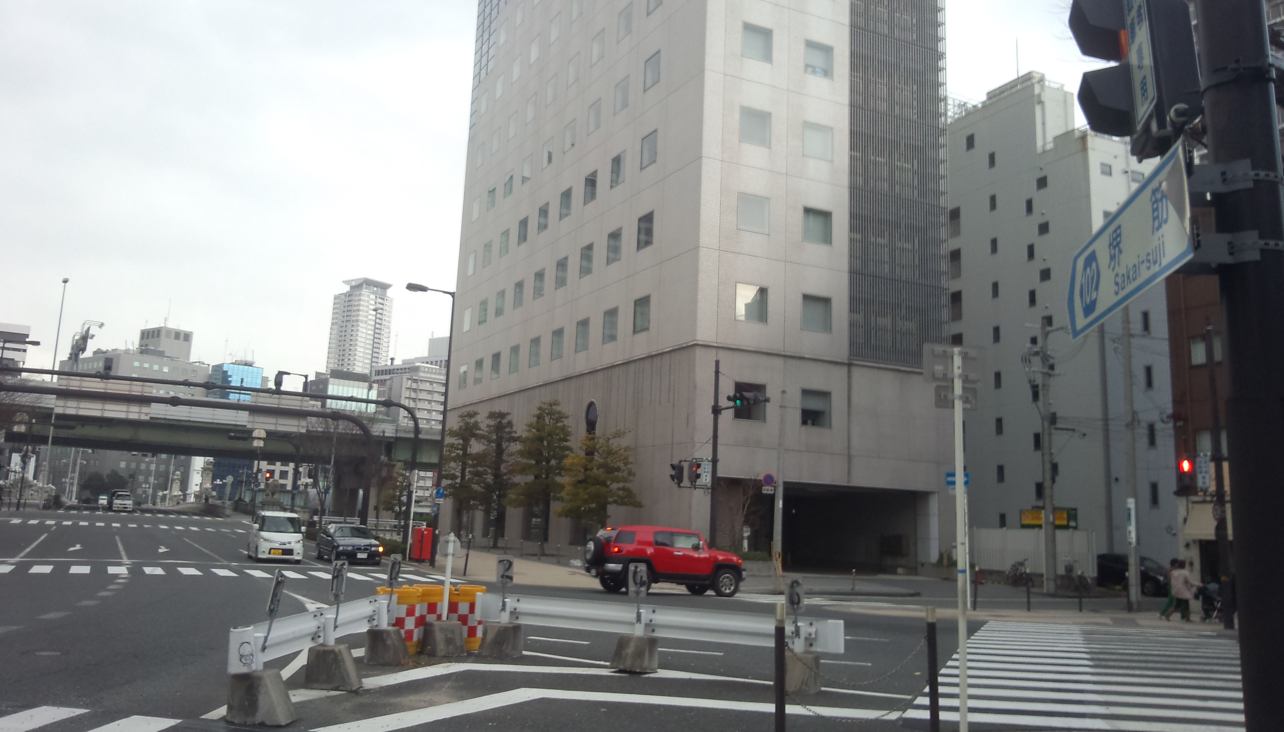 堺筋の路上である。写真右寄りに道路番号が記載されている。